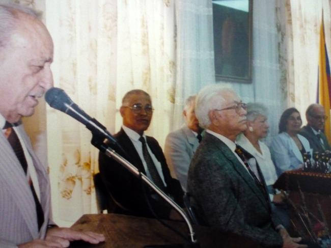 Founder of the modern the penitentiary usage and professionalization of their study. Member of the Royal Academy.